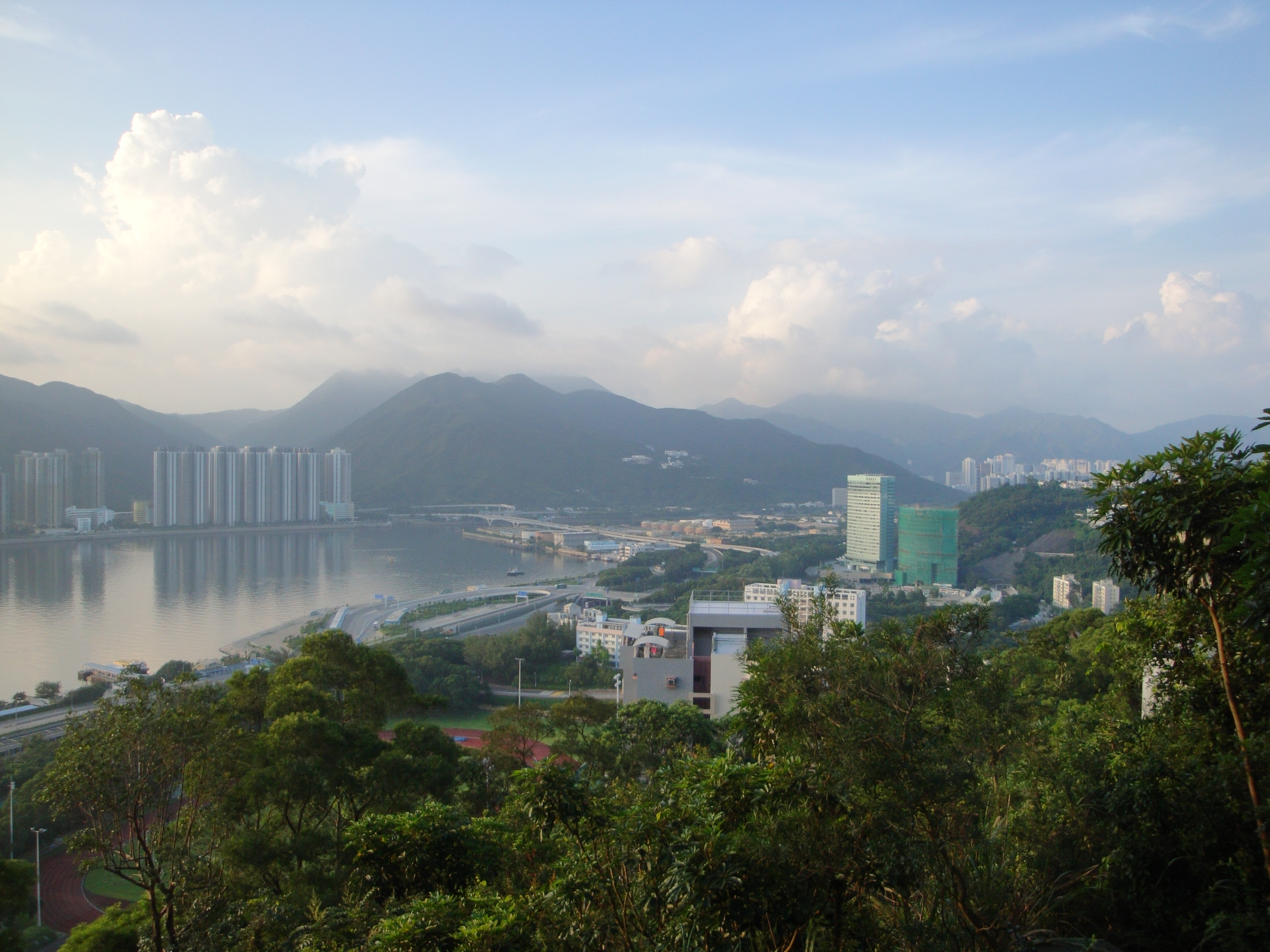 CUHK view